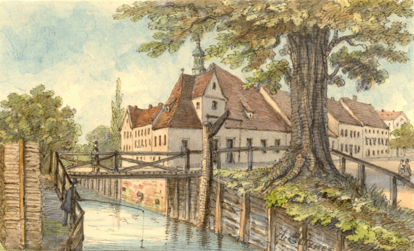 Vor dem Münztor in Leipzig im Jahre 1865, Aquarell